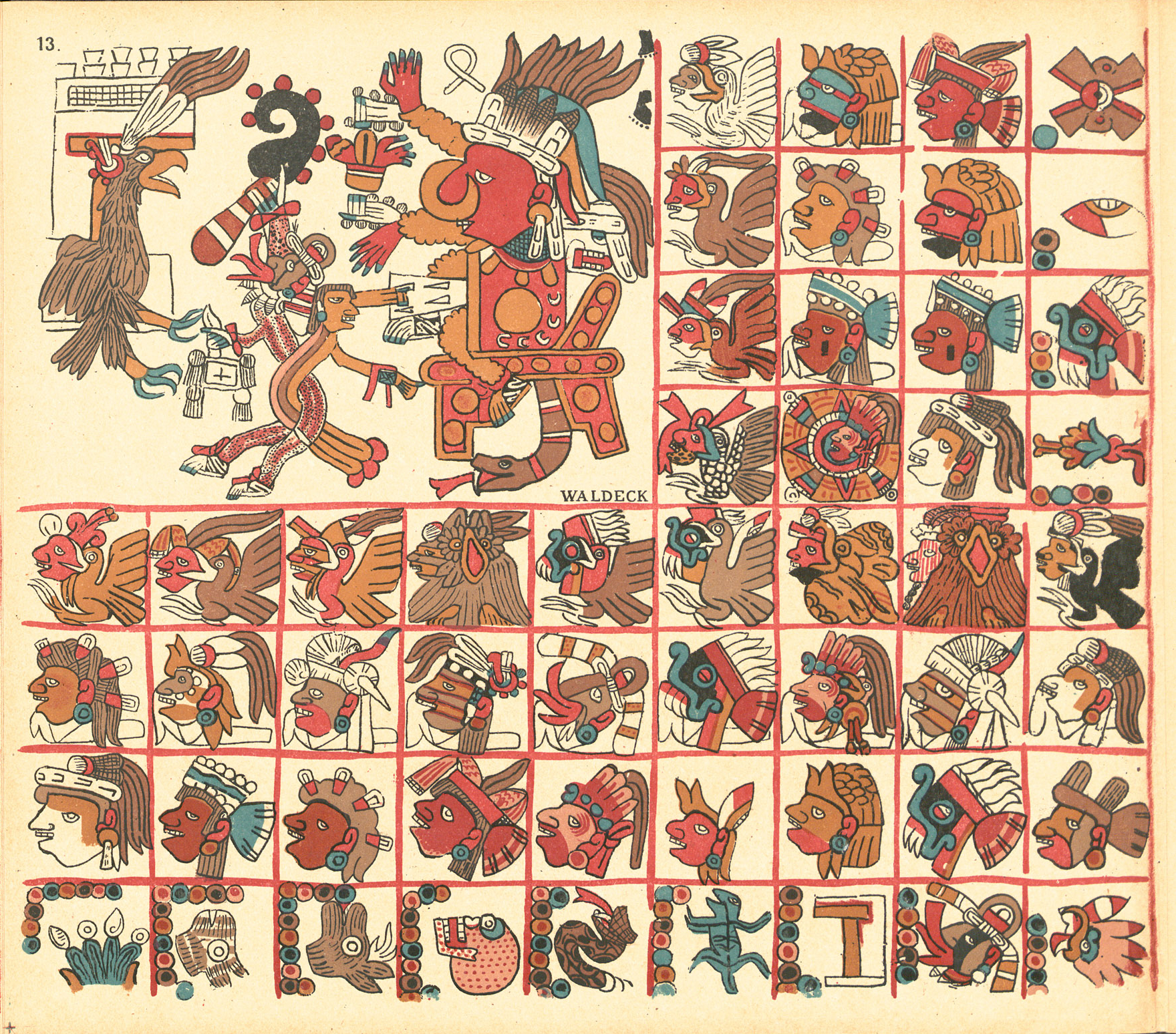 Lámina 13 del Tonalámatl de Aubin, códice mexica de la colección del duque de Loubat.